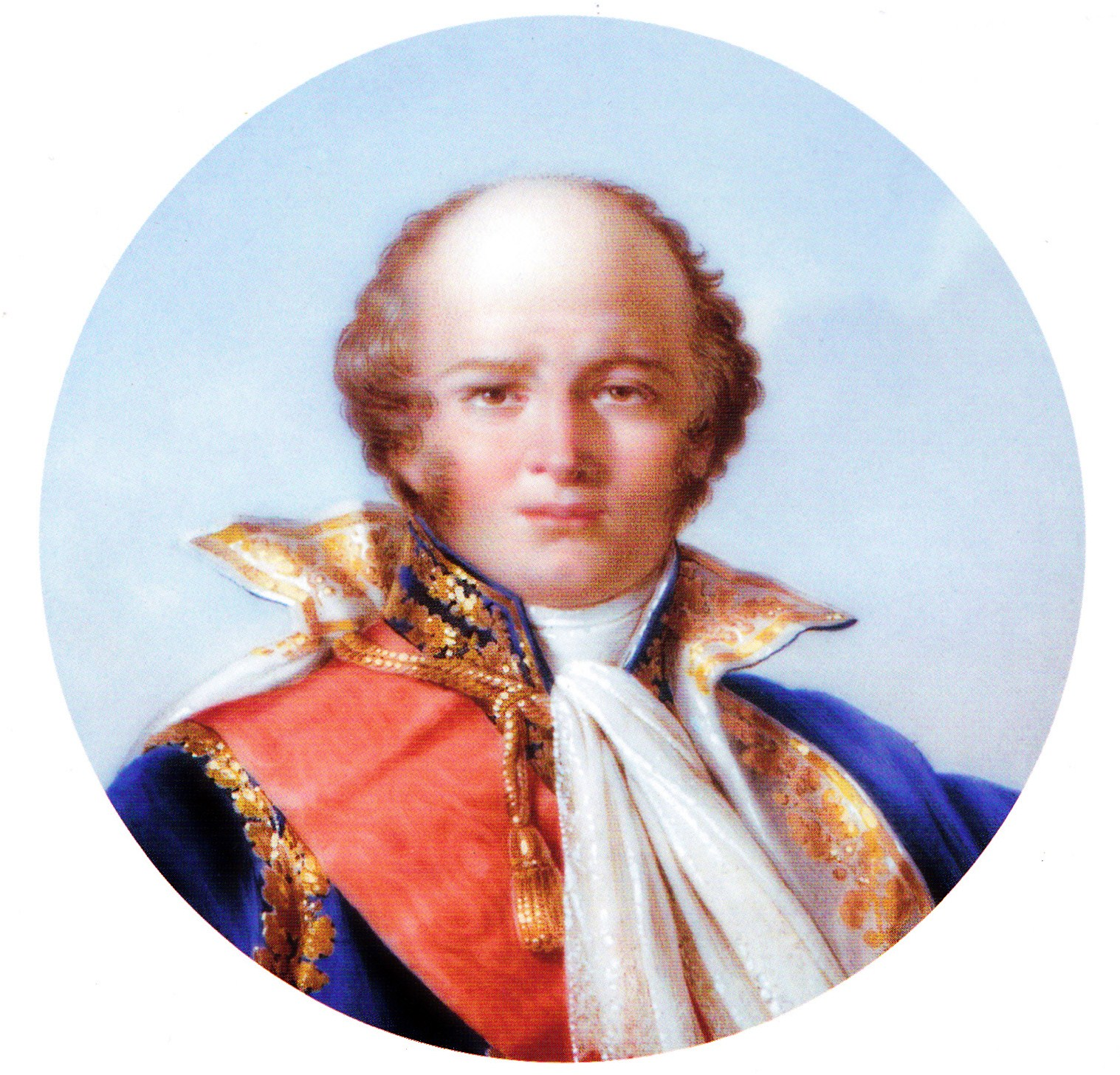 Portrait en buste de Louis-Nicolas Davout